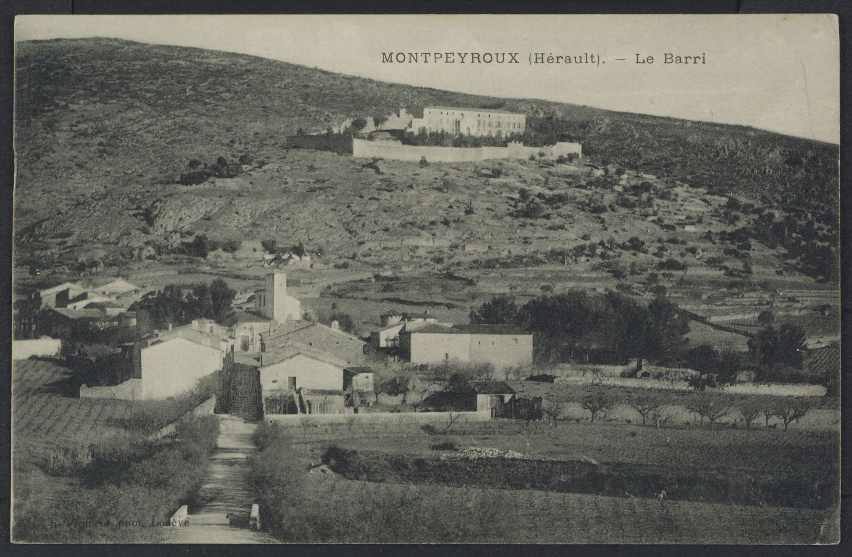 Montpeyroux. - Le Barri, 1ère moitié du XXe siècle : carte postale